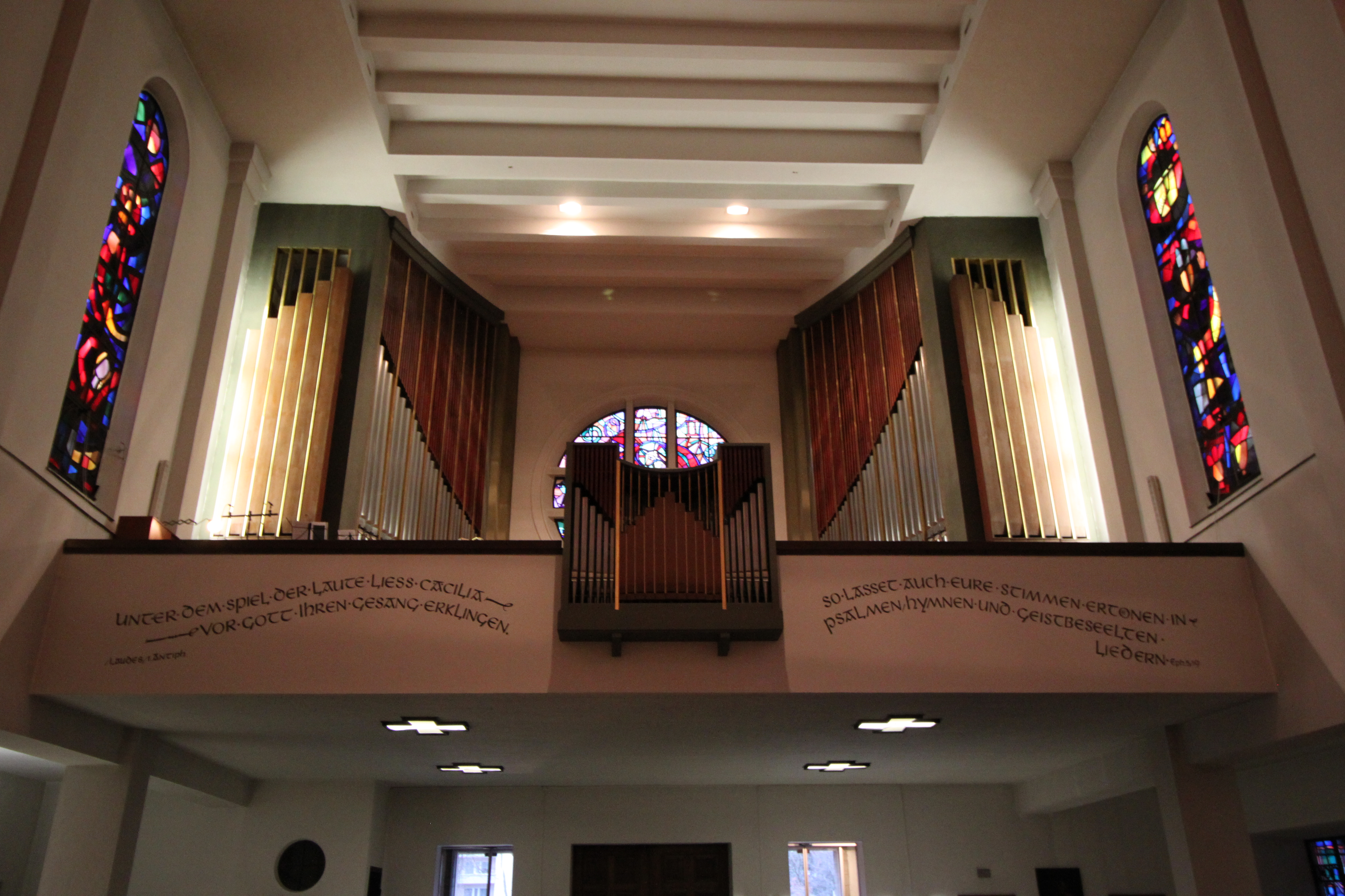 Kath. Pfarrkirche Christus König, Orgelempore